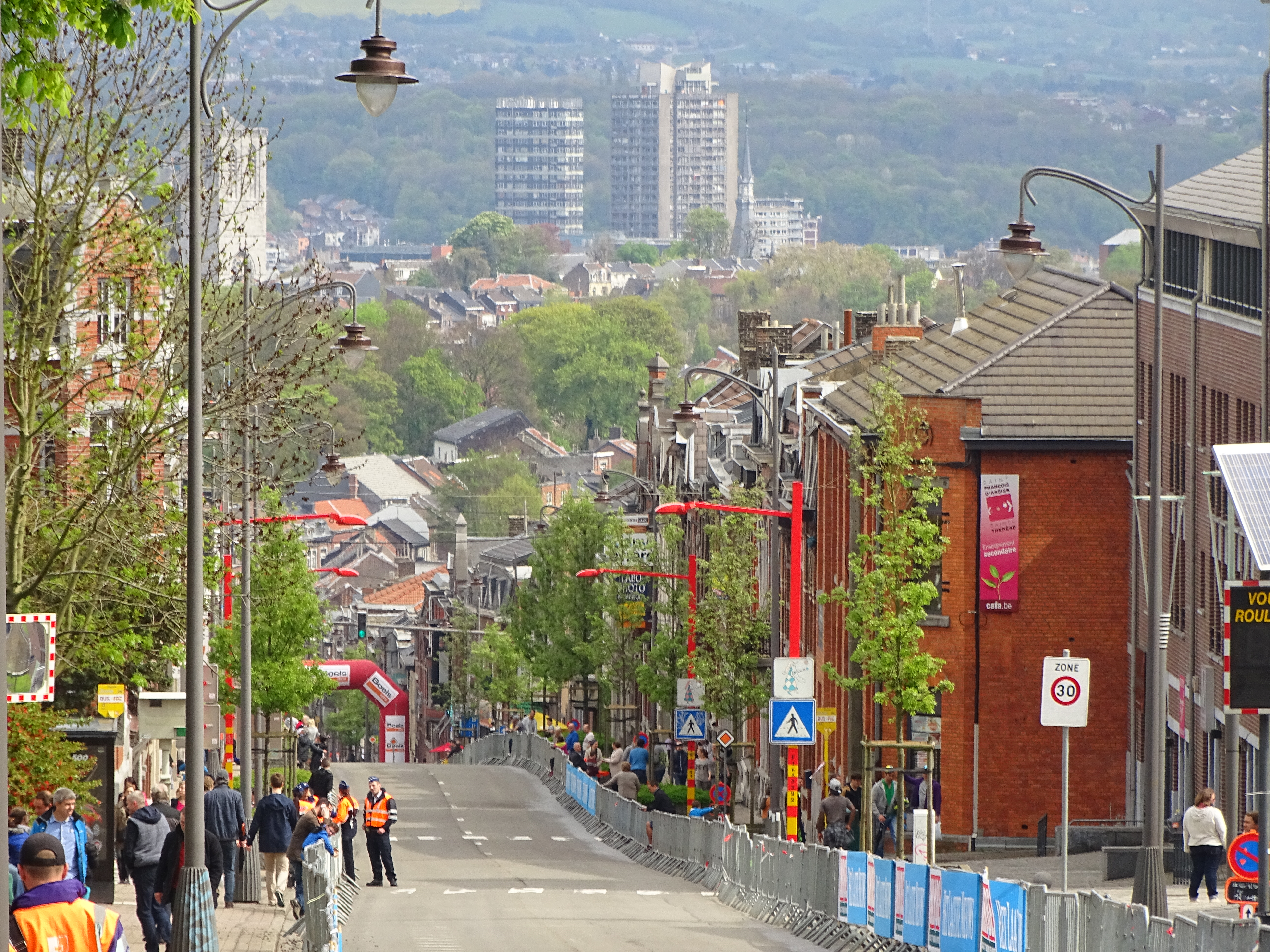 Reportage réalisé le dimanche 26 avril à l'occasion de l'arrivée de Liège-Bastogne-Liège 2015 à Ans, Belgique.